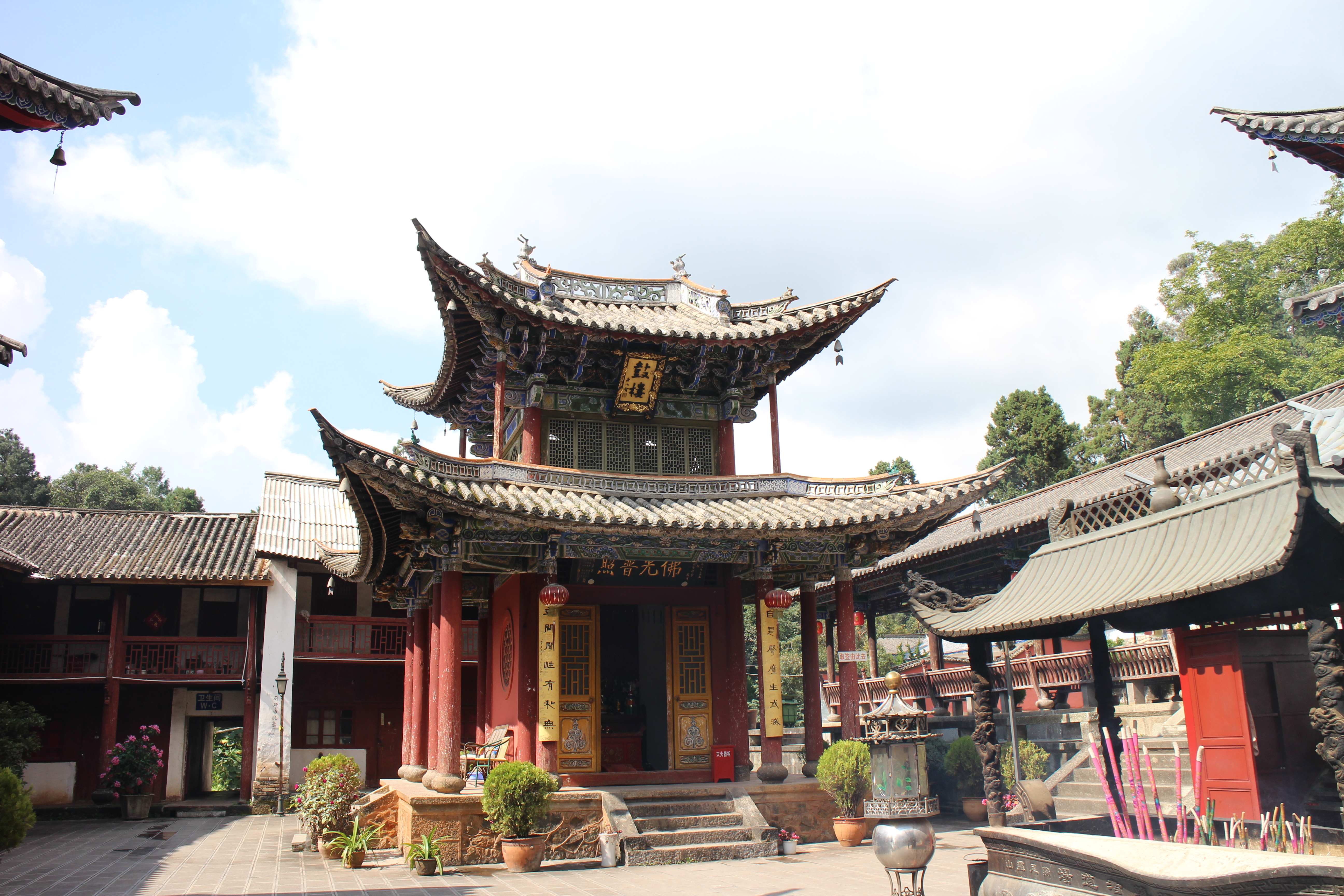 祝圣寺鼓楼